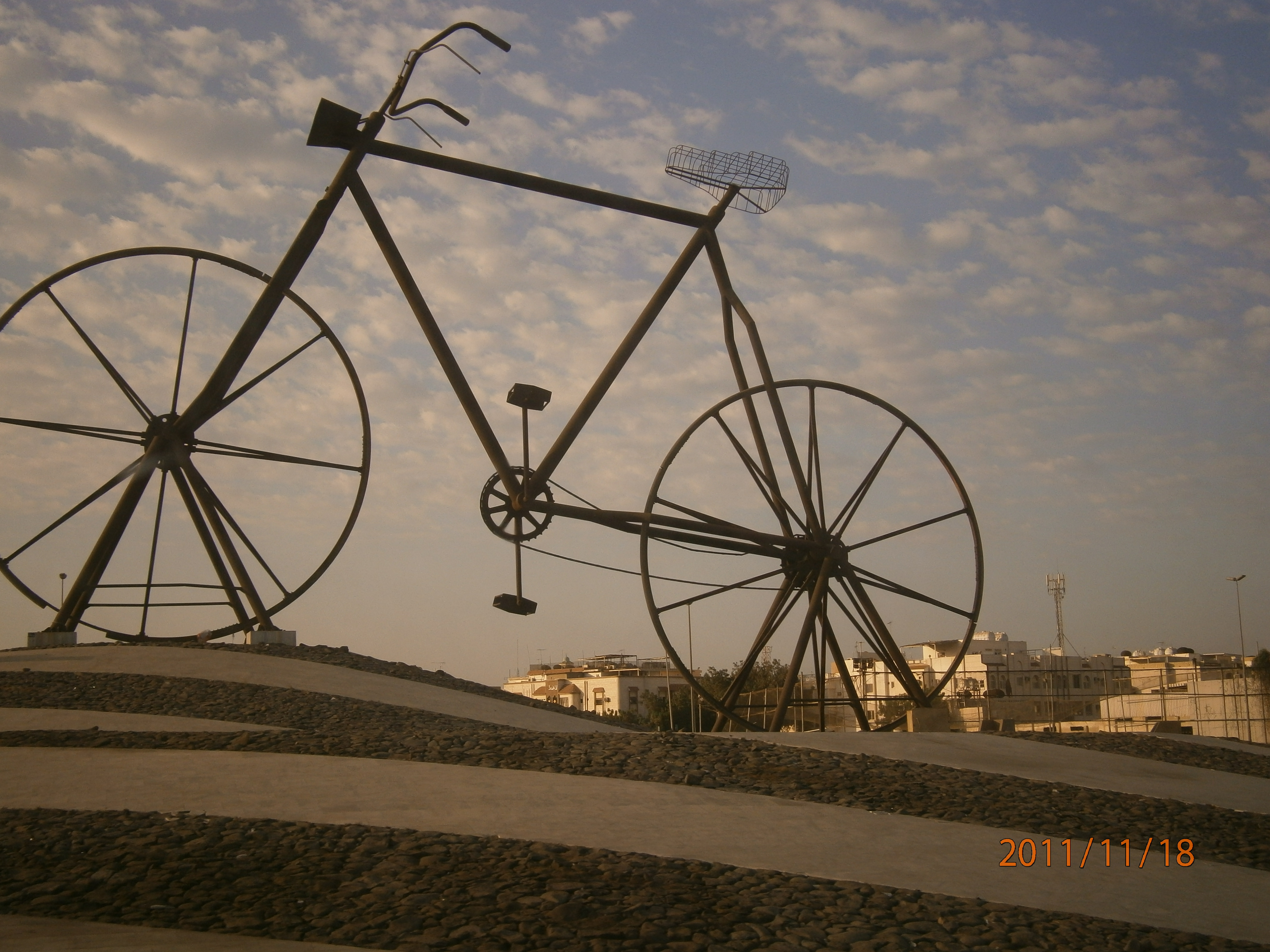 Sepedah di jaman Nabi Adam yang ada di tengah kota Jeddah kawasan Al Mawadi